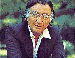 Giornalista Italiano